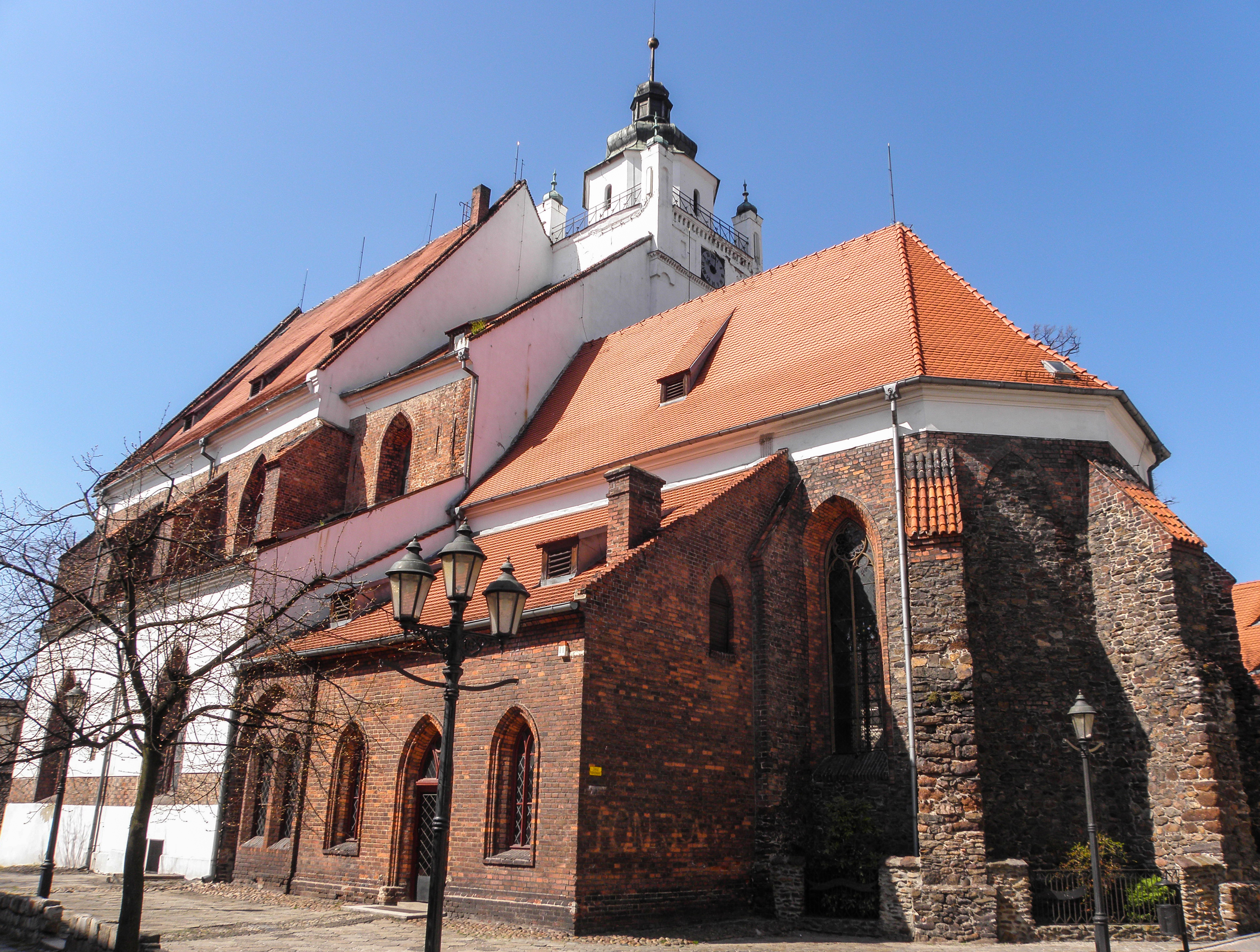 Kluczbork, kościół ewangelicki p.w. Chrystusa Zbawiciela, XIV, XVIII